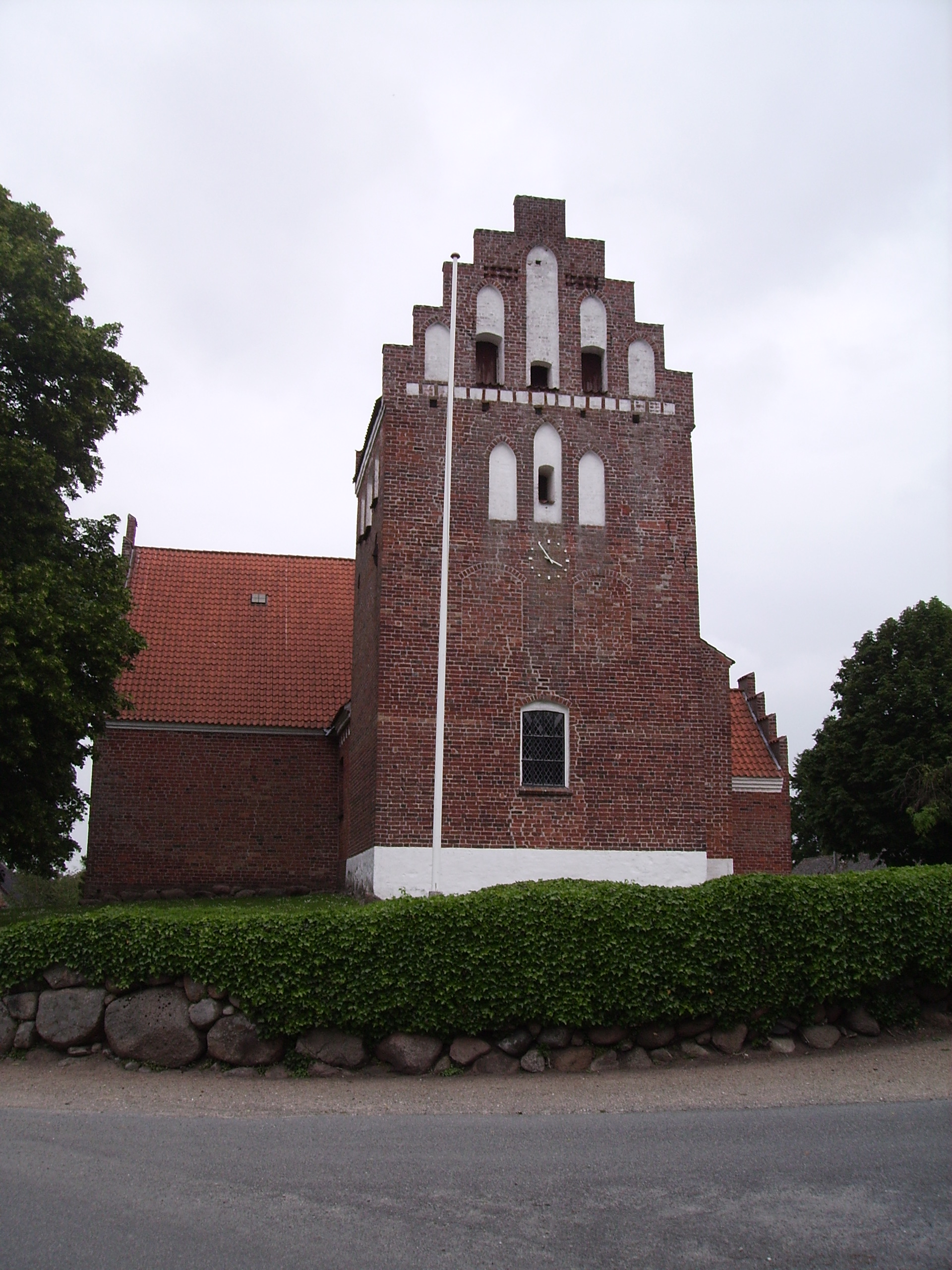 Rønninge Kirke, Rønninge Sogn, Åsum Herred, Odense Amt, Denmark (Danish Church) - Rønninge Kirke fra vest